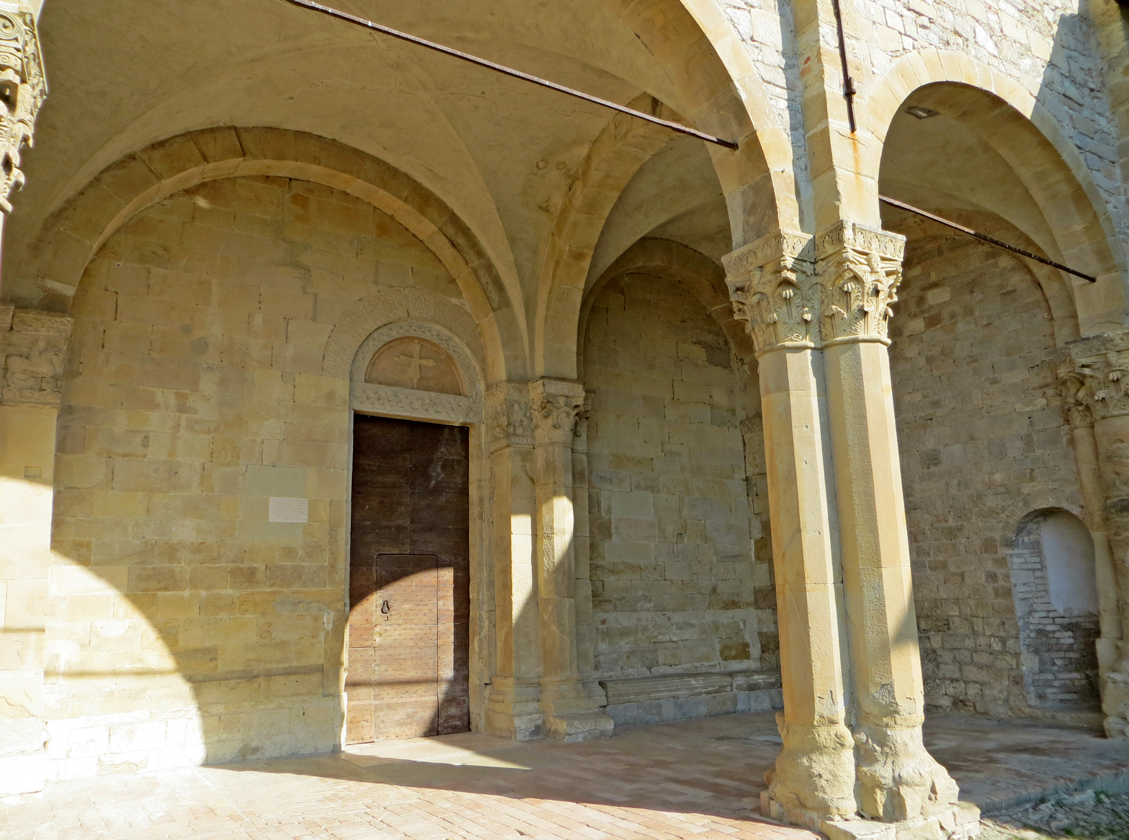 Abbazia di San Basilide (San Michele Cavana, Lesignano de' Bagni) - nartece della chiesa dei Santi Pietro e Paolo This is a photo of a monument which is part of cultural heritage of Italy.